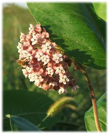 Asclepias syriaca